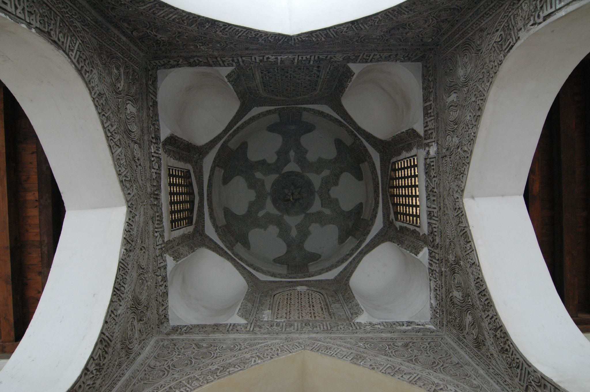 Cairo: moschea di El-Azhar